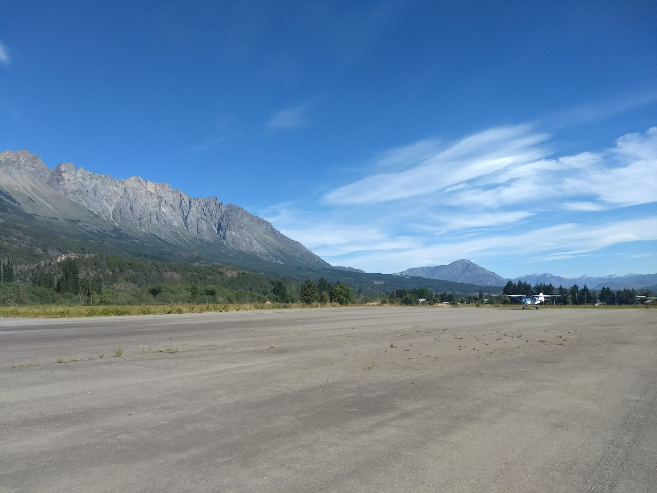 Pista del Aerodromo El Bolson, con el avión del aeroclub. De fondo, el cordón Piltriquitrón